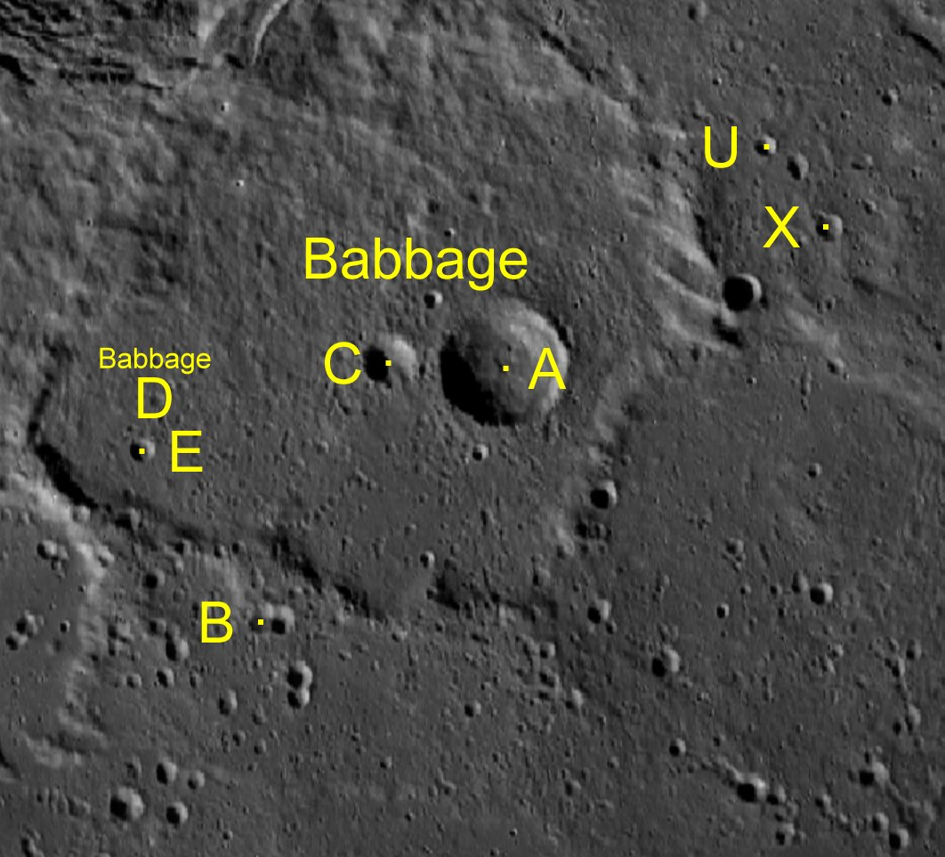 Cráter lunar Babbage. Cráteres satélite. (Imagen LRO)